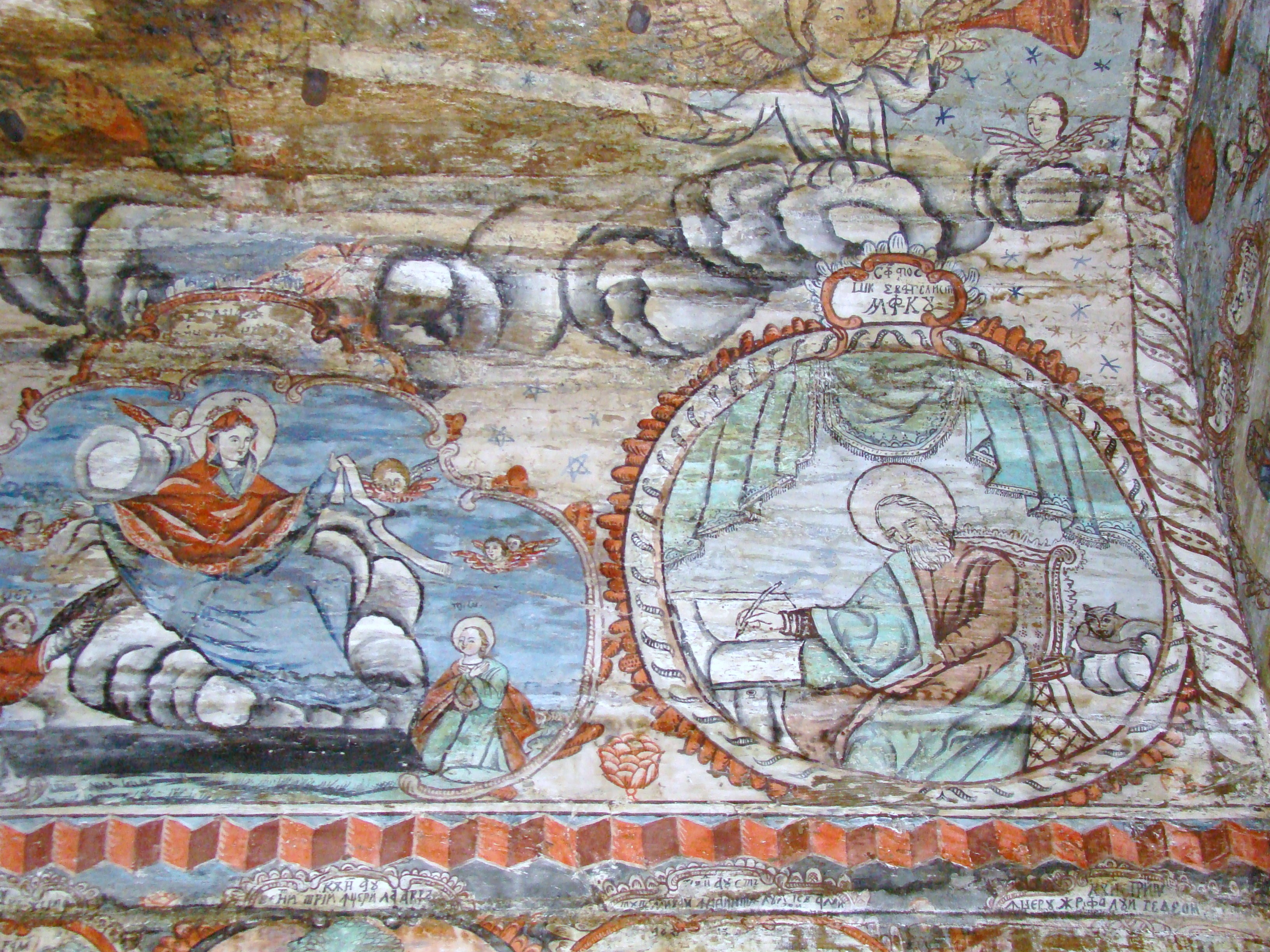 Biserica de lemn "Intrarea Maicii Domnului în Biserică" , sat BÂRSANA